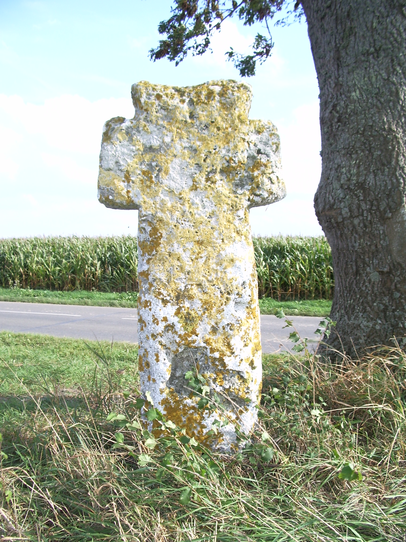 Croix de pierre à Cambron, Somme, France.